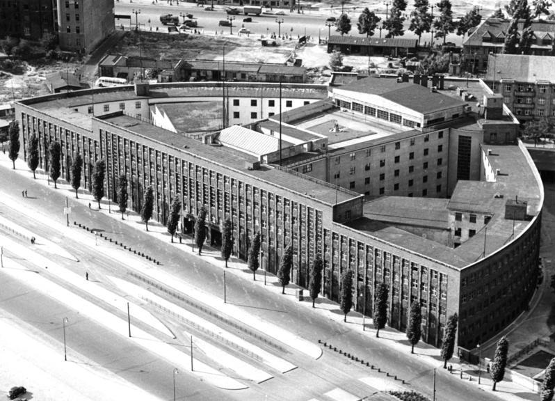 West-Berlin, Masurenallee Haus des Rundfunks Sender Freies Berlin